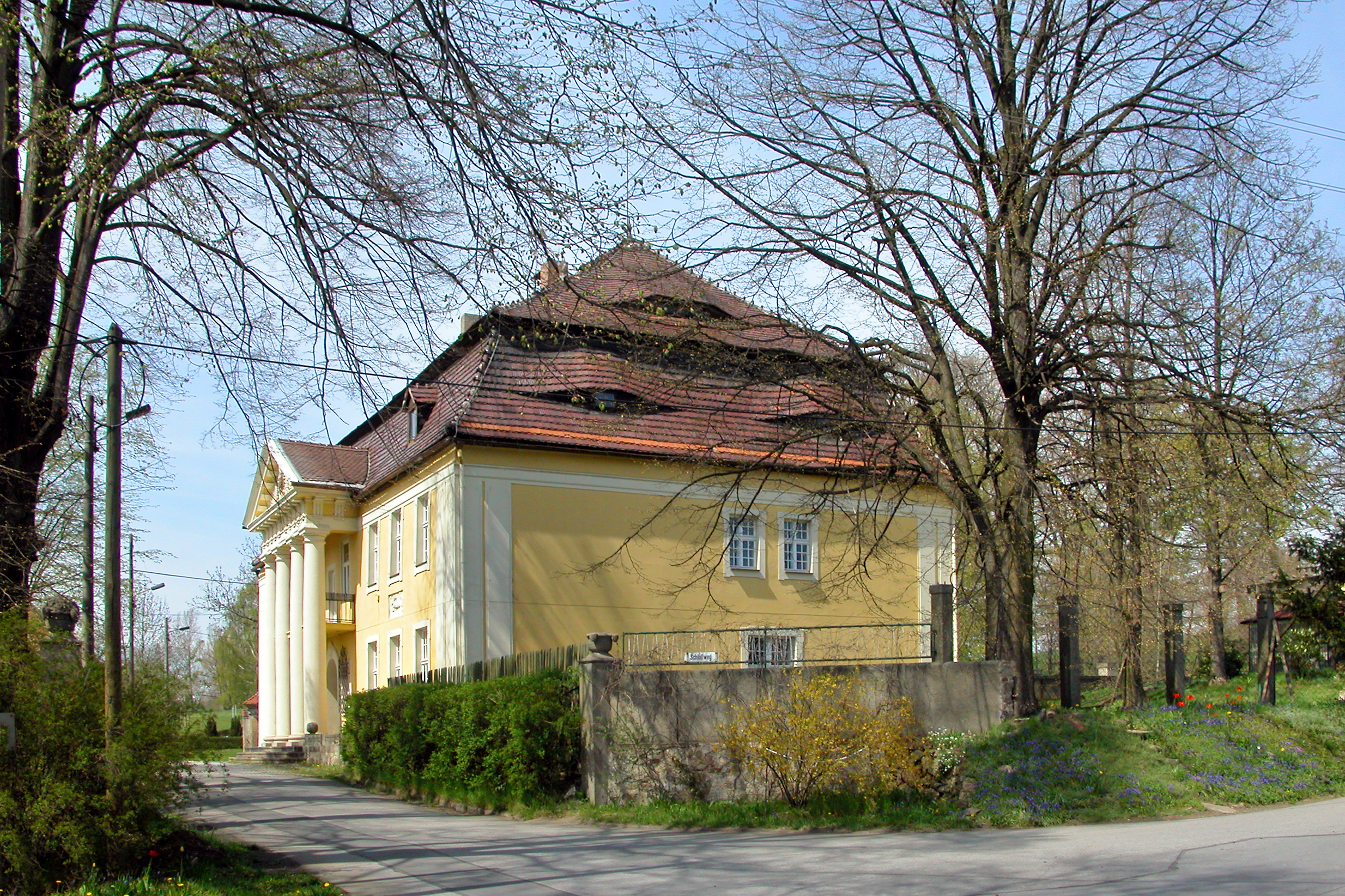 28.04.2008 02747 Niederstrahwalde (Strahwalde) Schloßweg (GMP: 51.029817,14.733179): Schloß Niederstrahwalde, erbaut im 18. Jh. unter August Leopold von Kyaw. In der DDR Kindergarten. 2002 privatisiert. [DSCN32544.JPG]20080428500DR.JPG(c)Blobelt